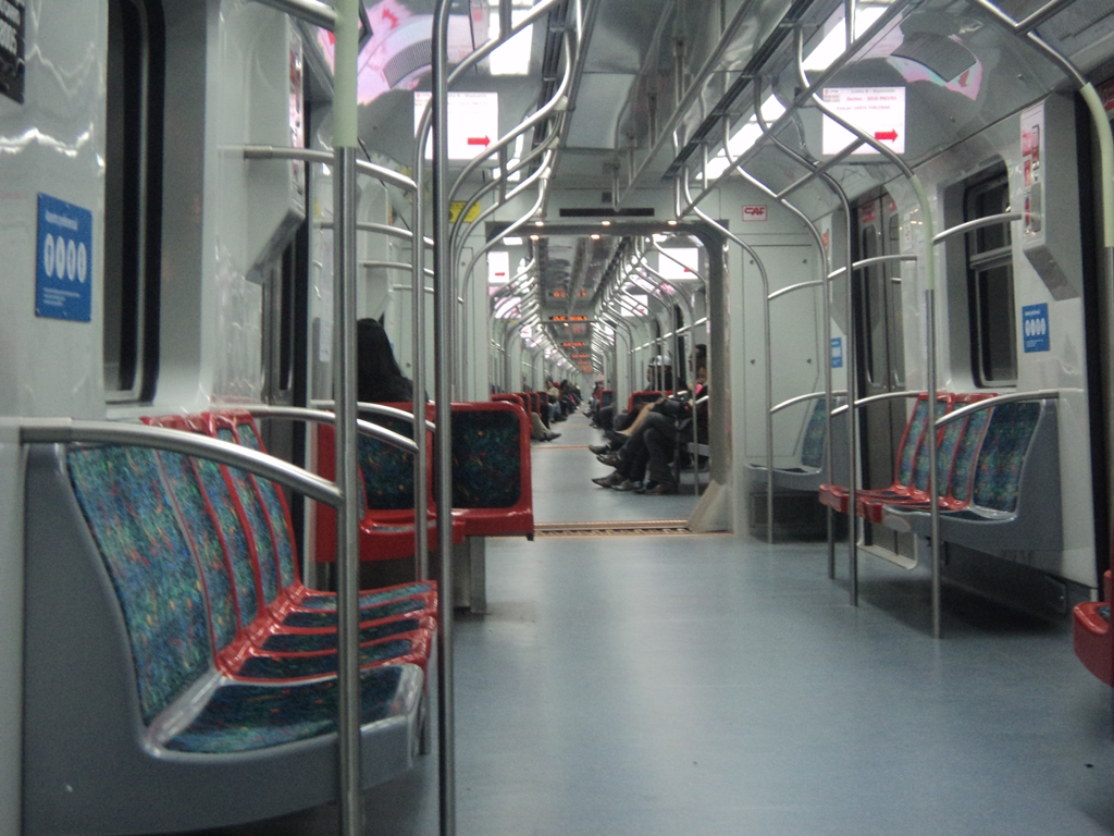 Passagem entre vagões no TUE CAF Série 8000 CPTM.